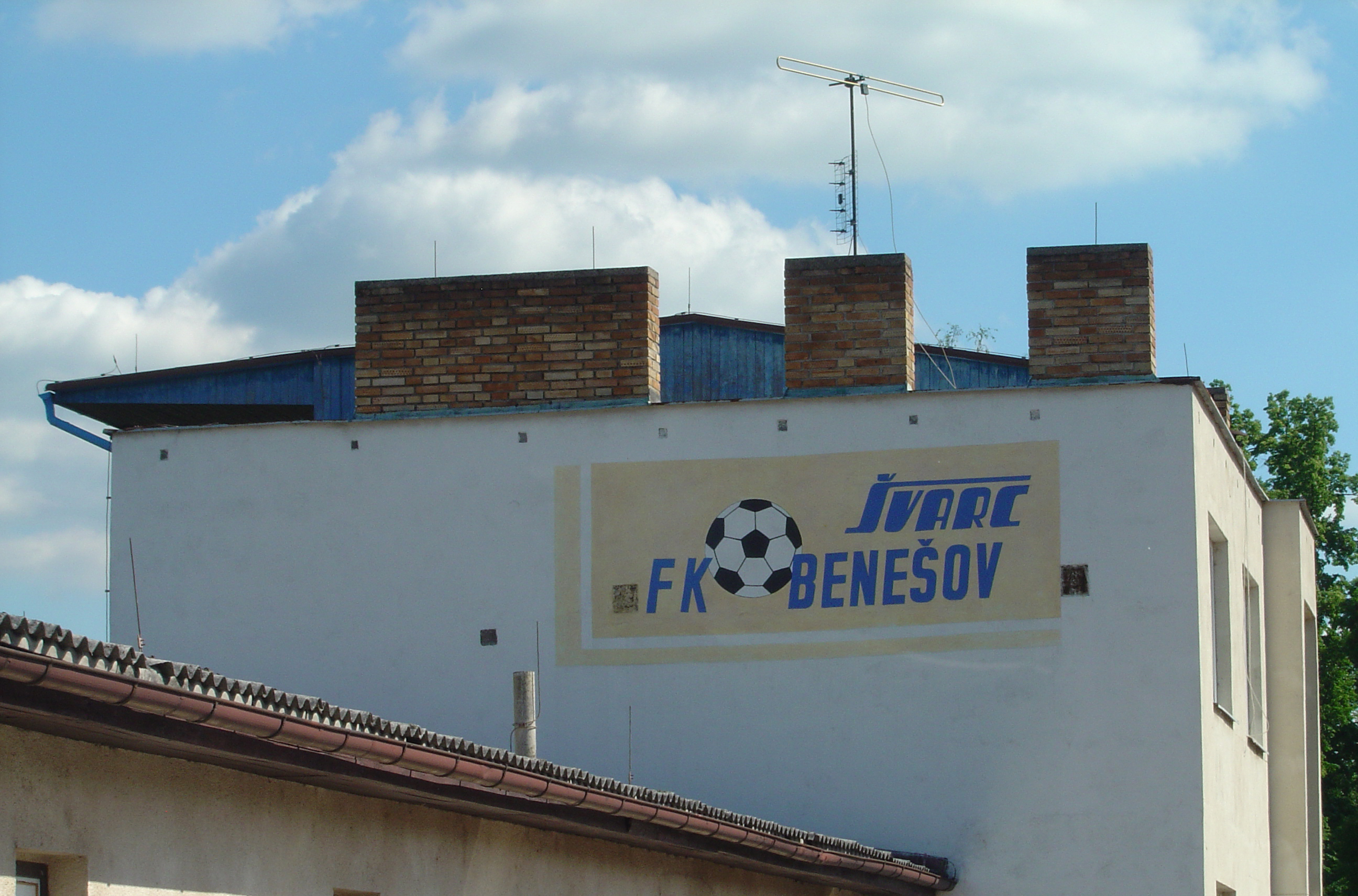 Logo des FK Svarc Benesov auf einem Nebengebäude der Haupttribüne des Fußballstadions im tschechischen Benesov